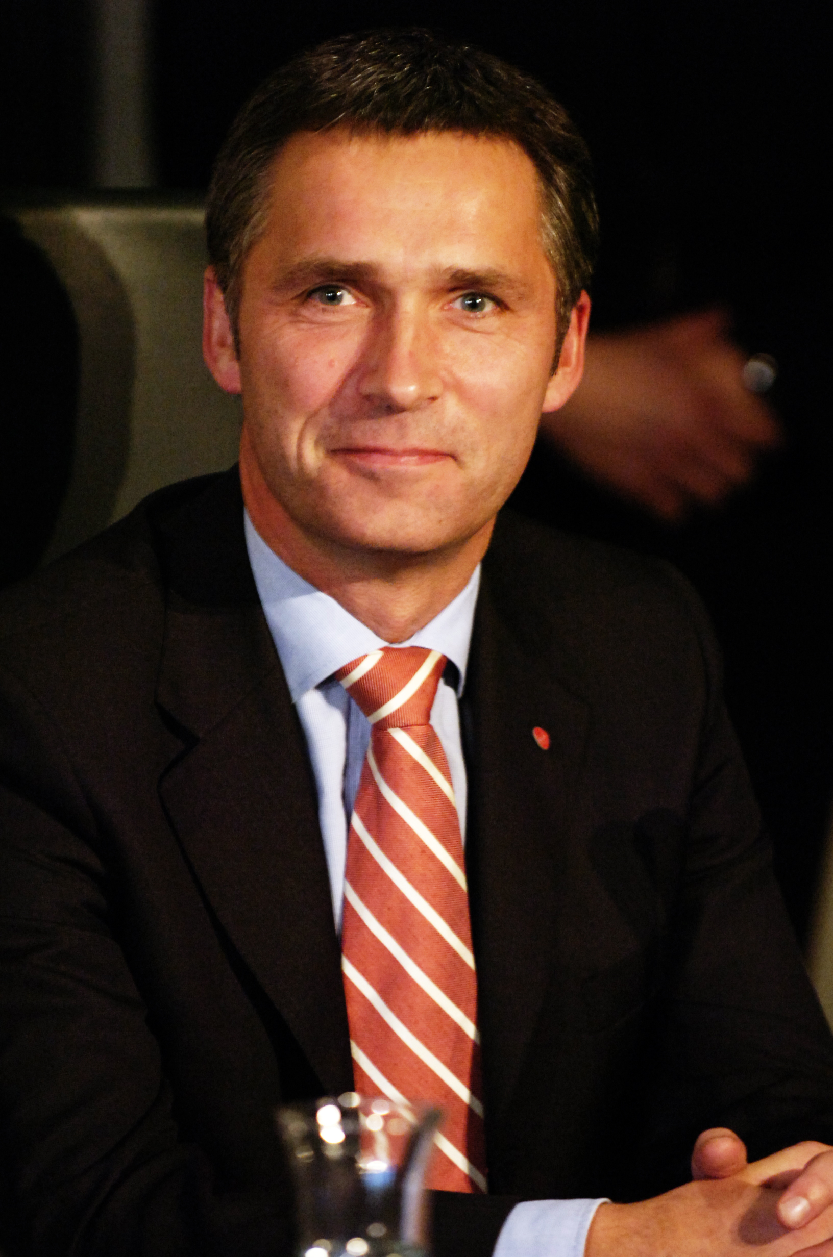 Jens Stoltenberg, statsminister Norge.